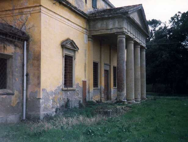 Livorno: i Bagnetti della Puzzolente (XIX secolo) progettati da Pasquale Poccianti e ora tristemente abbandonati.